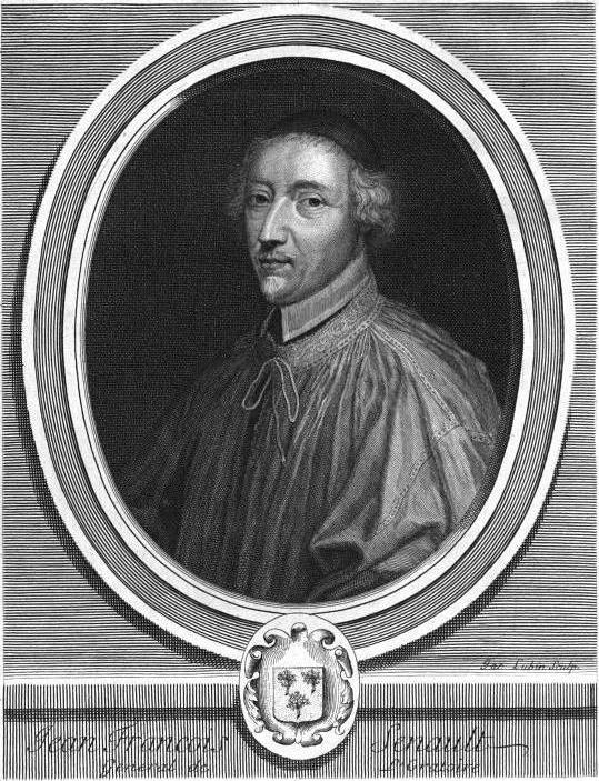 Jean François Senault, général de l'Oratoire.